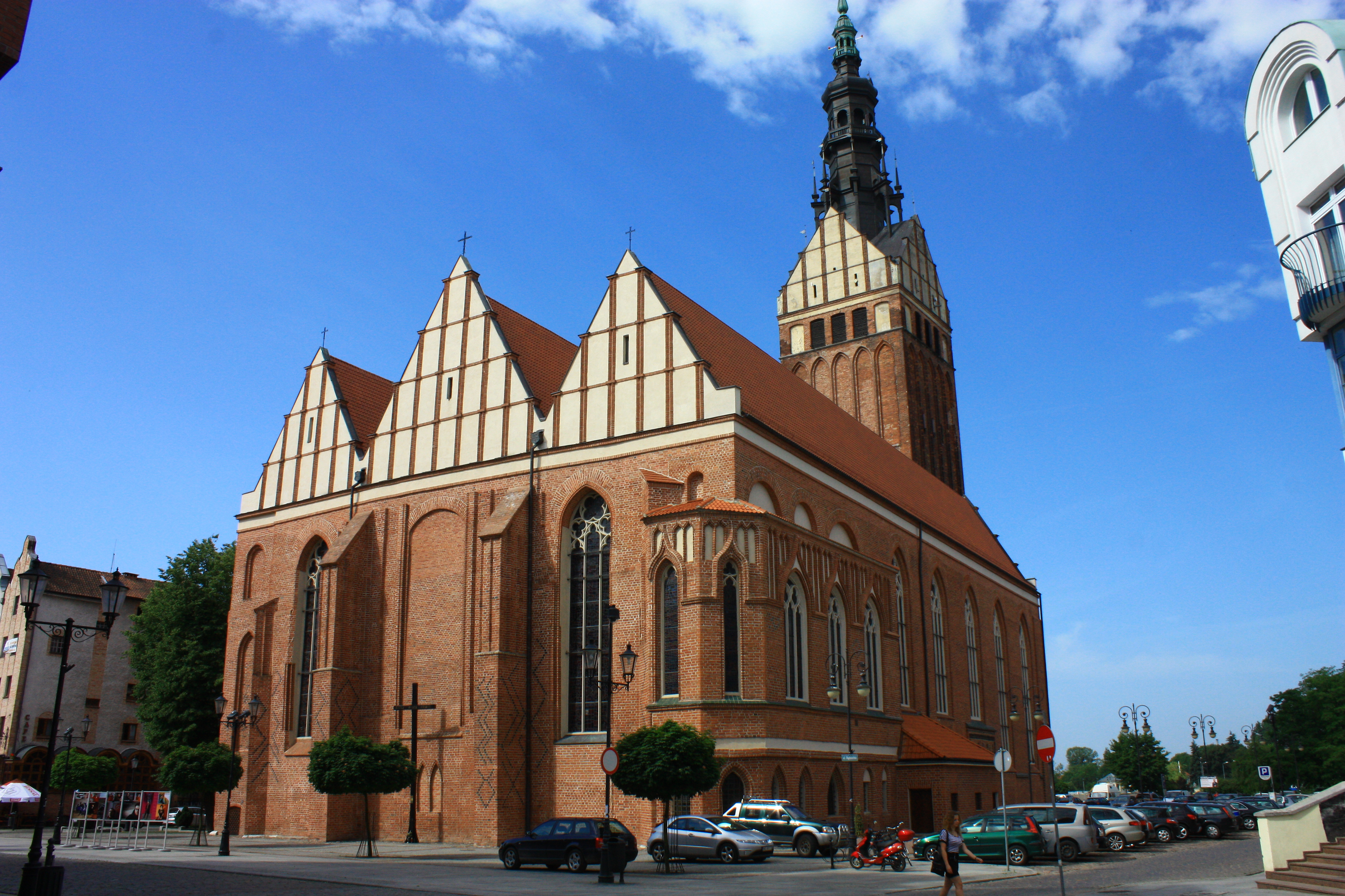 Elbląg, kościół par., ob. katedra p.w. św. Mikołaja, 1226, 1340-1380, 1953-1968